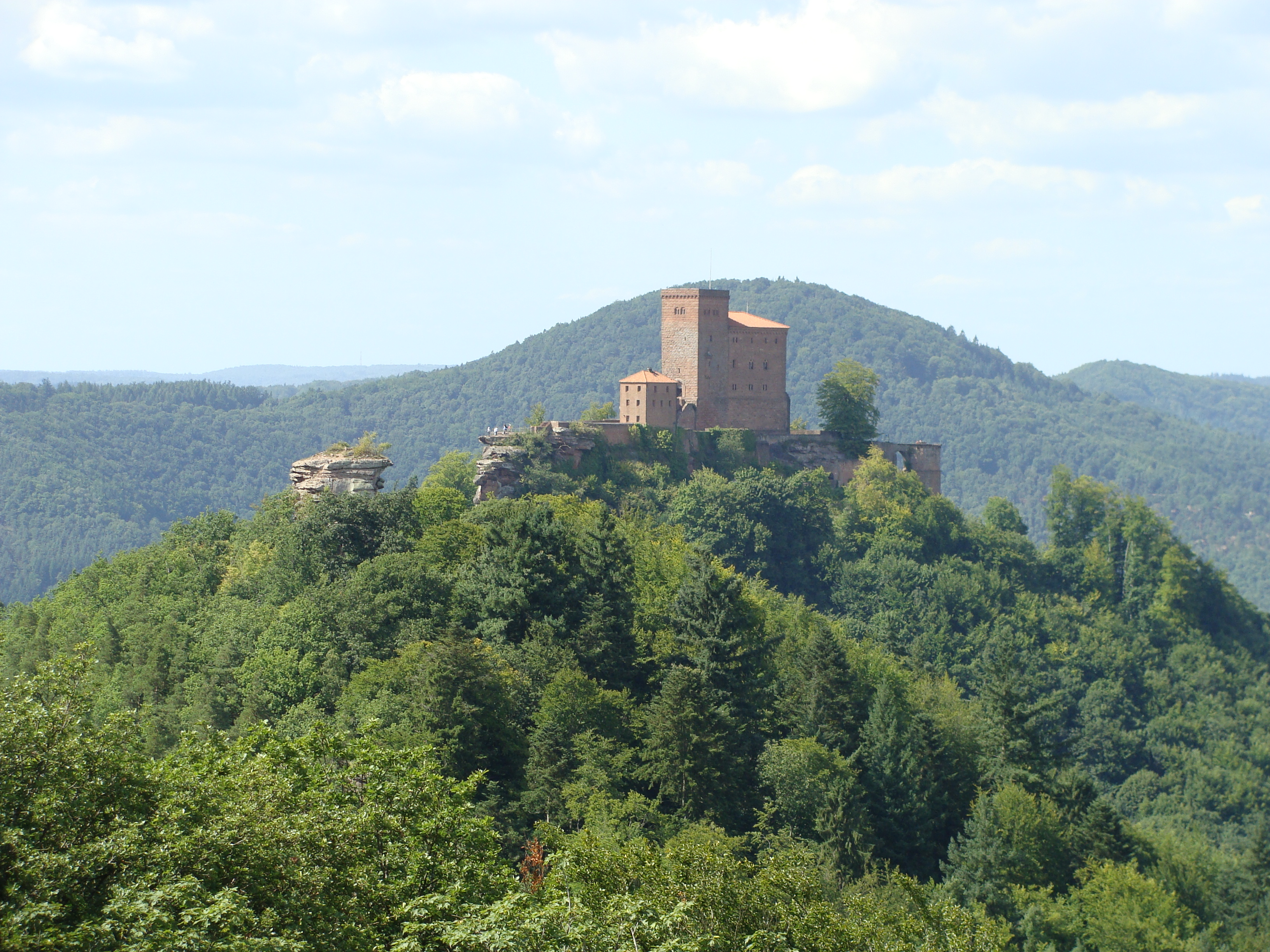 Burg Trifels auf dem Sonnenberg im Wasgau/Pfälzerwald - Blick von der Ruine Scharfenberg/Münz